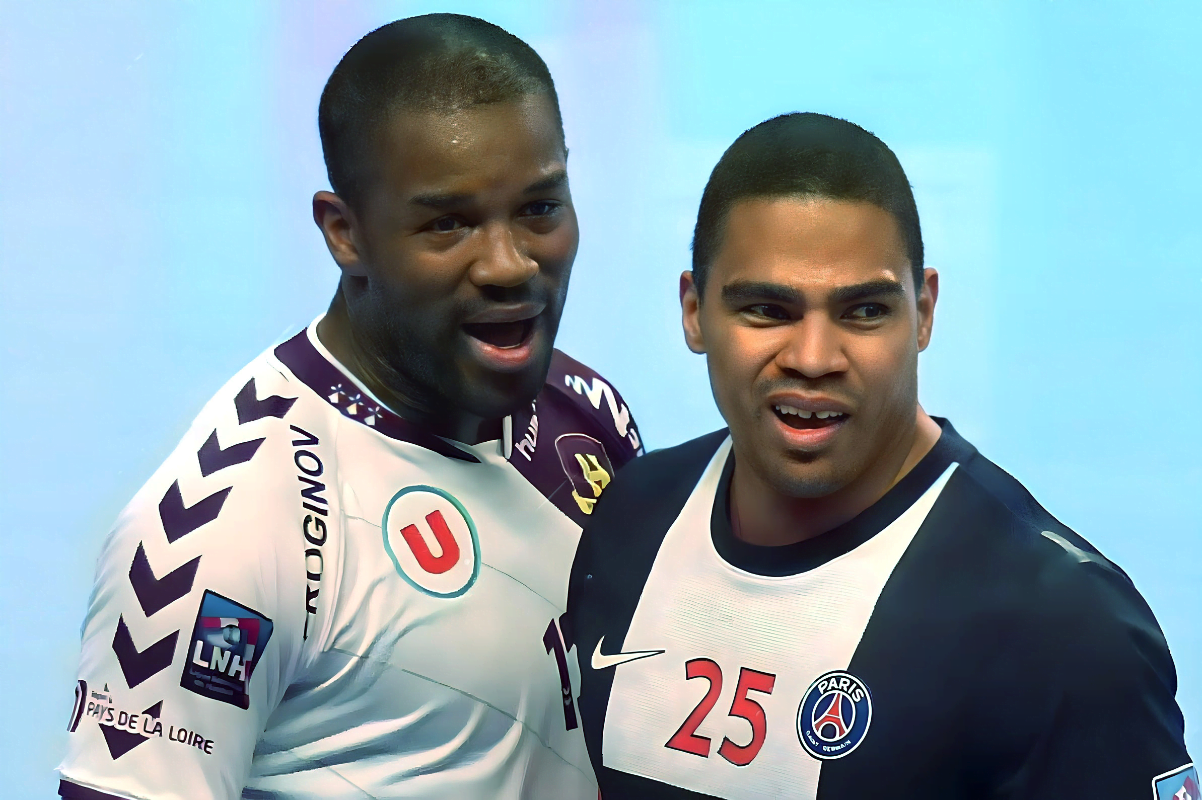 Rock Feliho, arrière gauche du club de handball HBC Nantes, lors du match face au PSG Handball, le 10 avril 2014. Avec son adversaire du jour Daniel Narcisse.